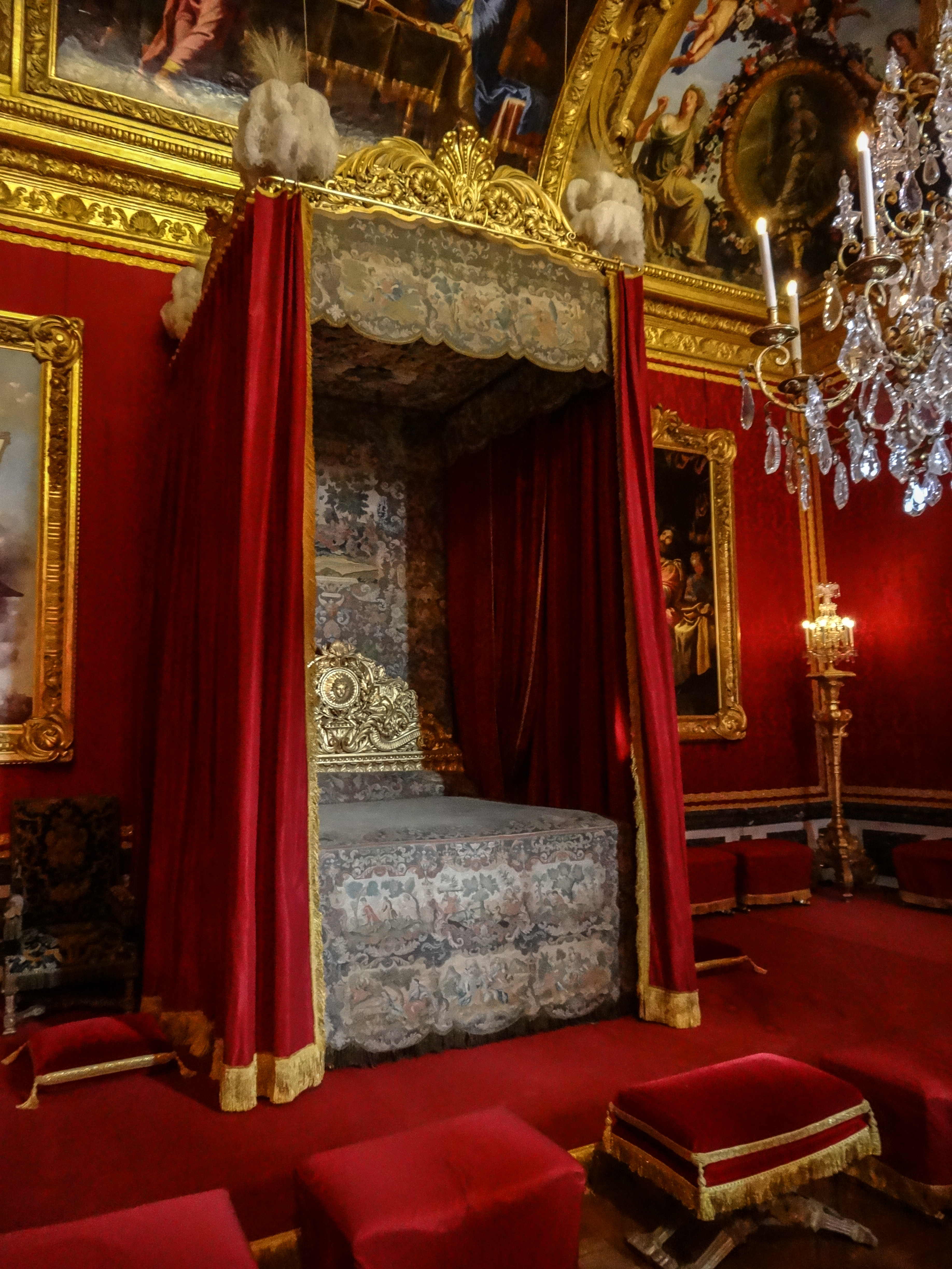 Salon de Mercure du Château de Versailles.